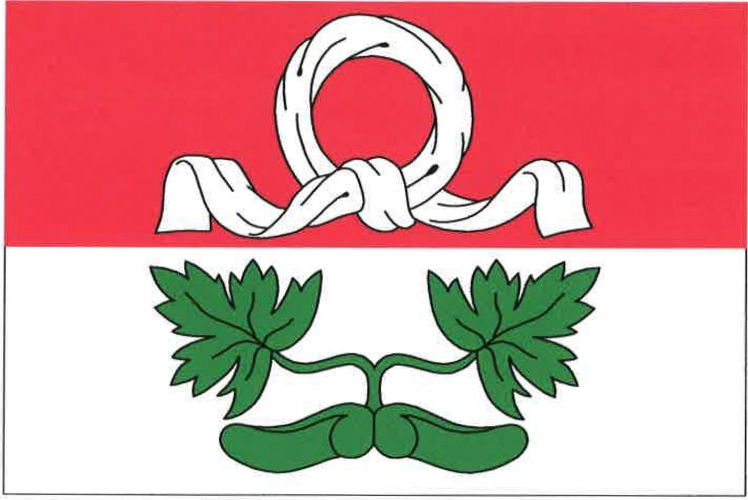 vlajka, Javorník , okres Benešov